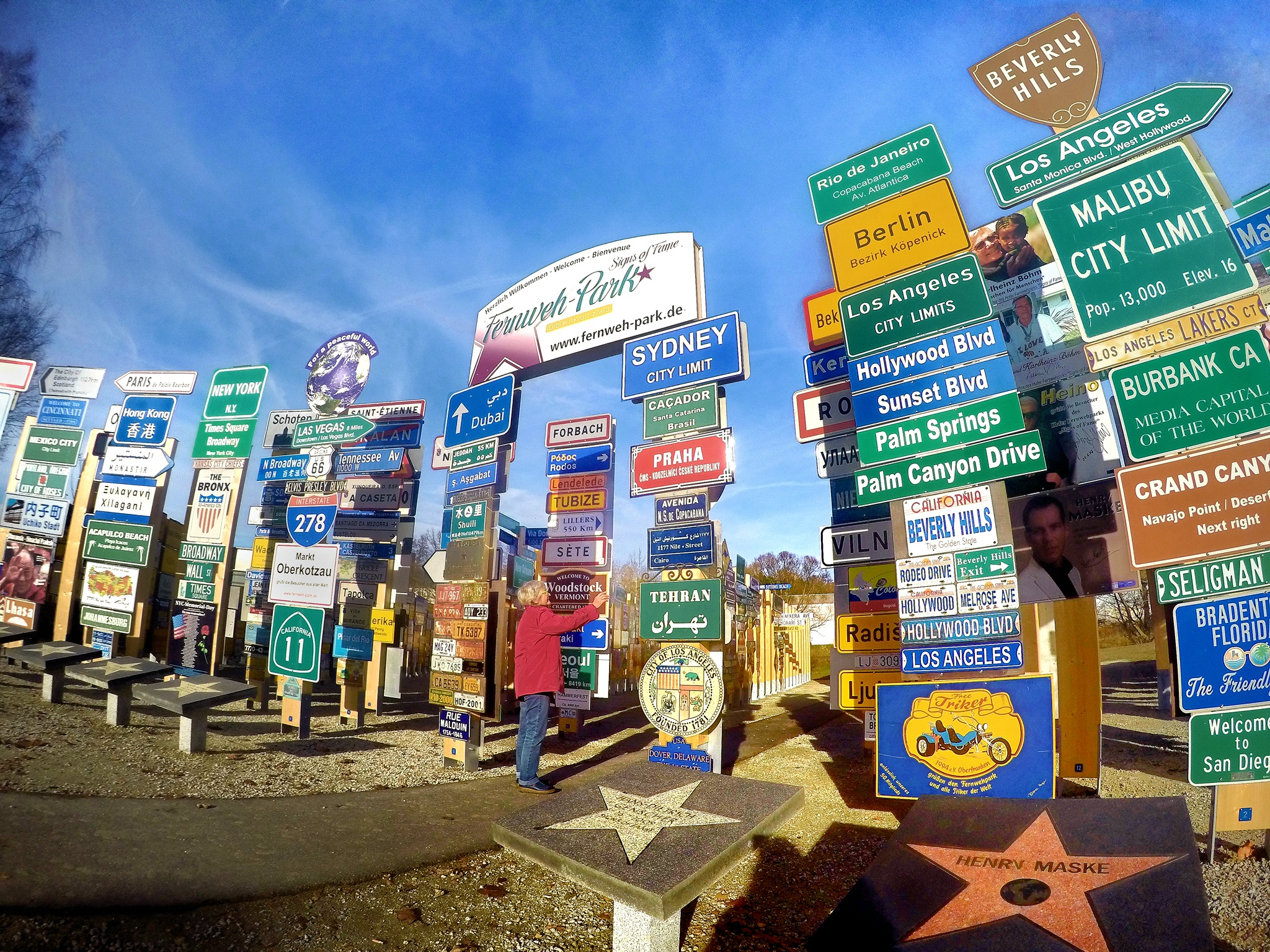 Eingangsbereich des neugestalteten Fernwehparks in Oberkotzau.